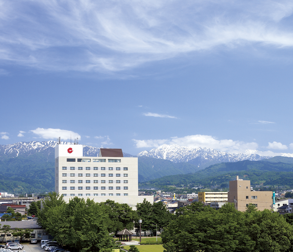 ホテル外観